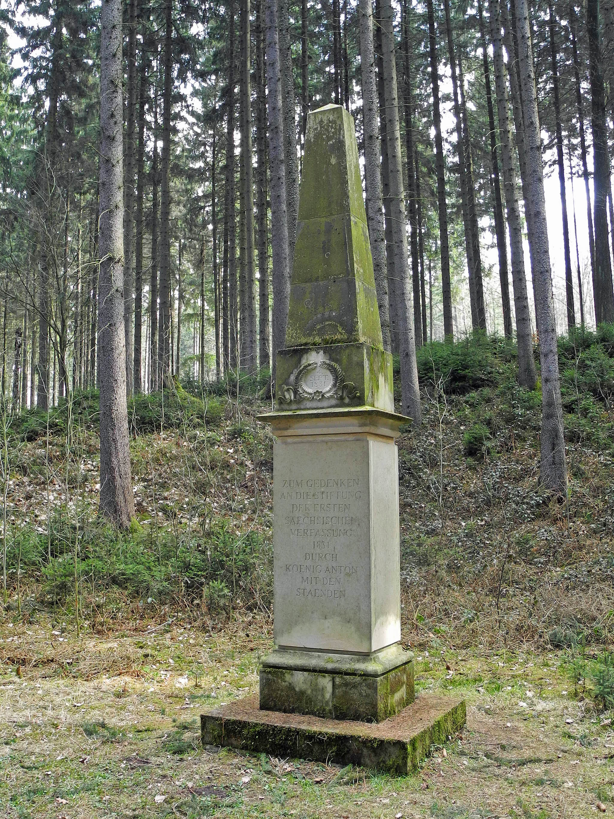 Verfassungsstein im Lieblingstal